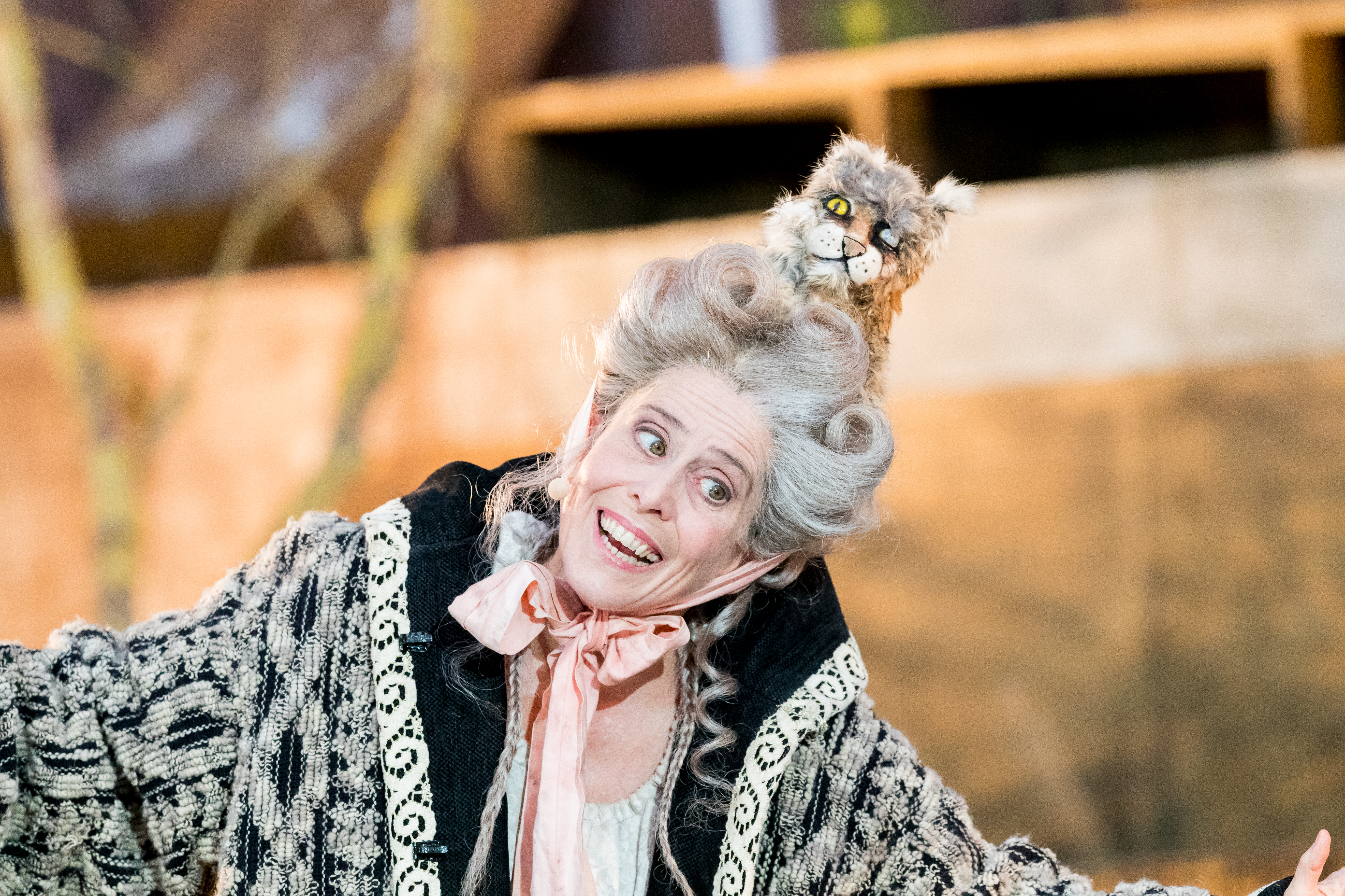 Karin Pfammatter during Nibelungenfestspiele "Siegfrieds Erben" at Wormser Dom, Worms, Rheinland-Pfalz, Germany on 2018-07-19, Photo: Sven Mandel